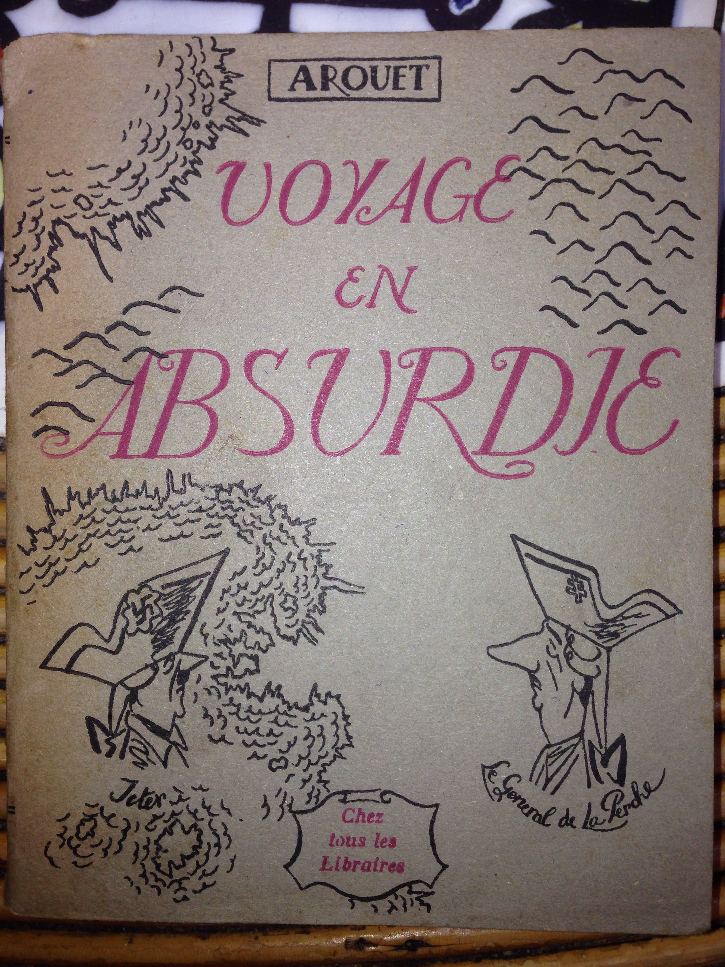 Couverture du Voyage en Absurdie de Arouet.